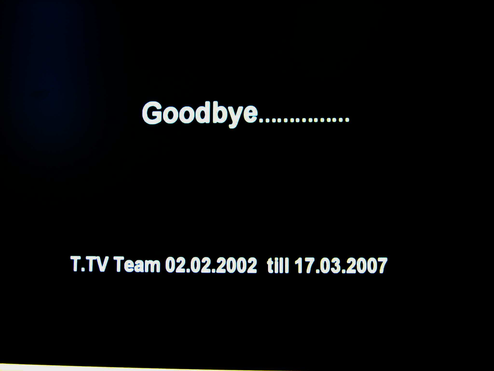 Ecran, deen d'Enn vun T.TV bekannt gemaach huet (Screenshot, am Mäerz 2007).